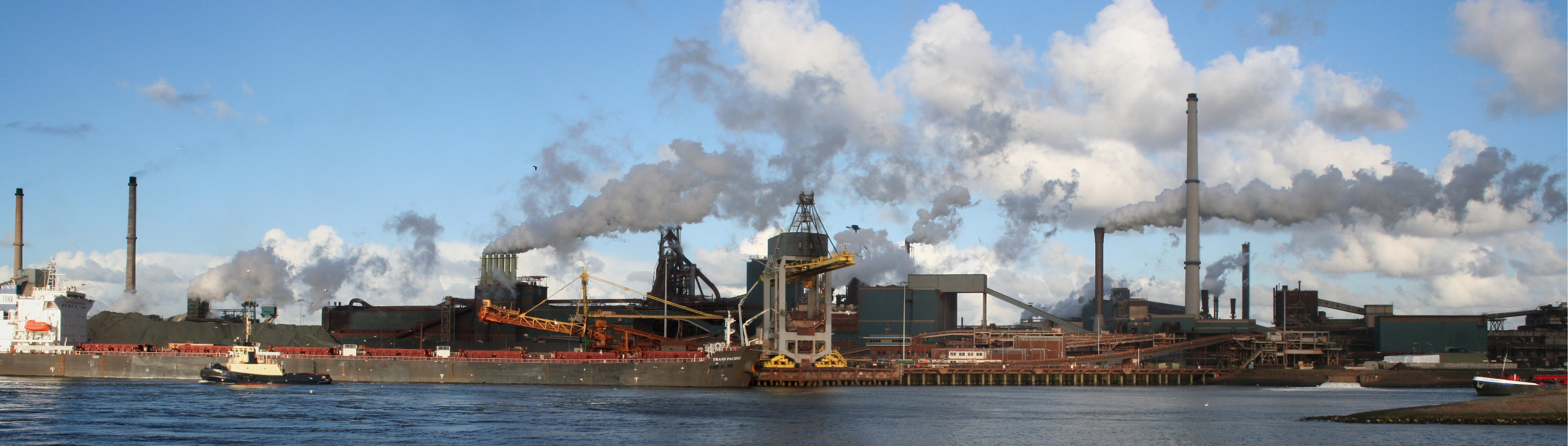 Panorama Corus IJmuiden photo by Sander van der Molen 9 december 2006